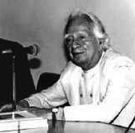 H J Koellreuter